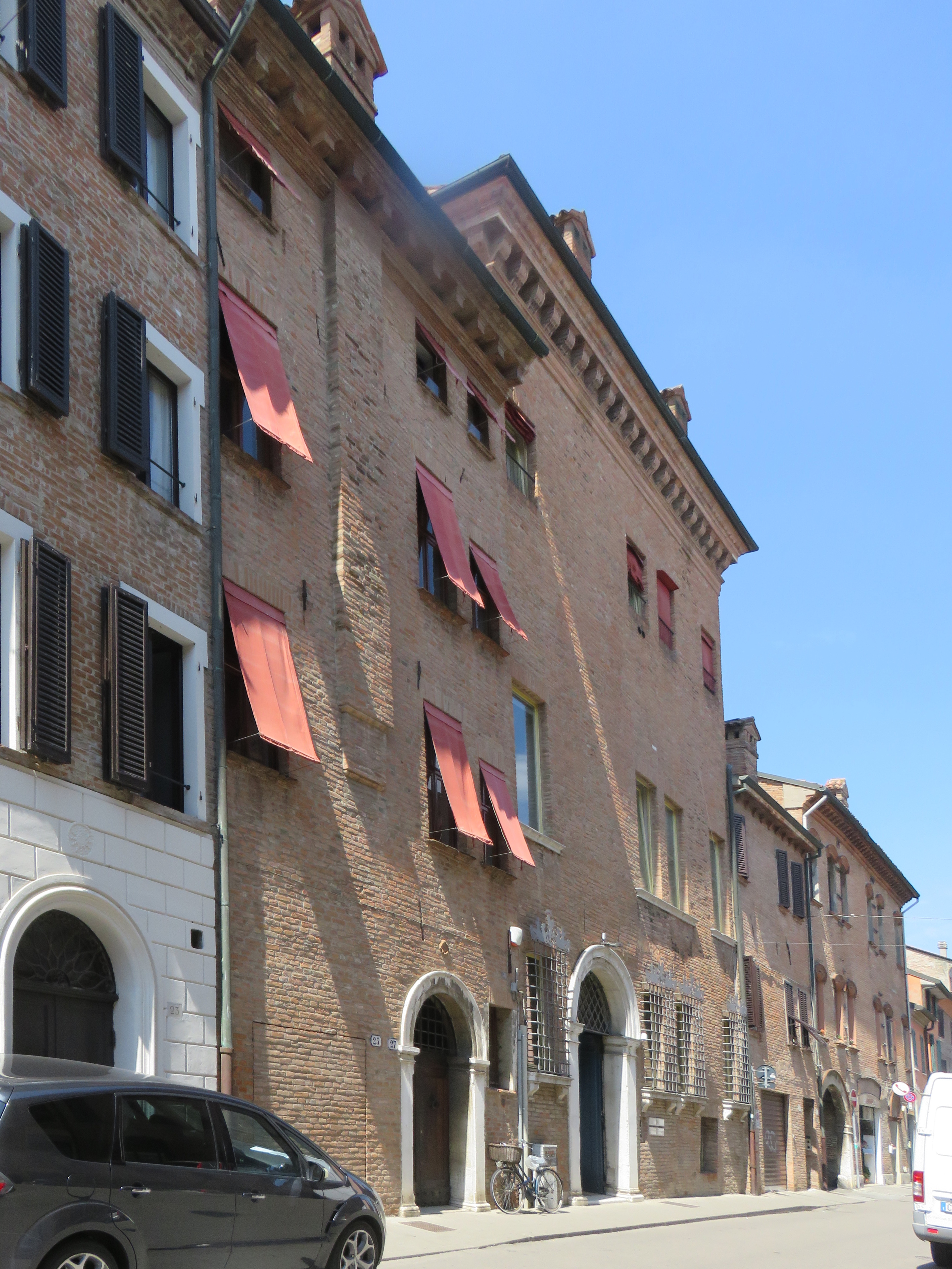 Palazzo in Via Ripagrande 29, abitazione che fu di Bartolomeo Chiozzi detto il Chiozzino. Leggermente più avanti, sulla destra nella foto, si vede il volto del Vicolo del Chiozzino